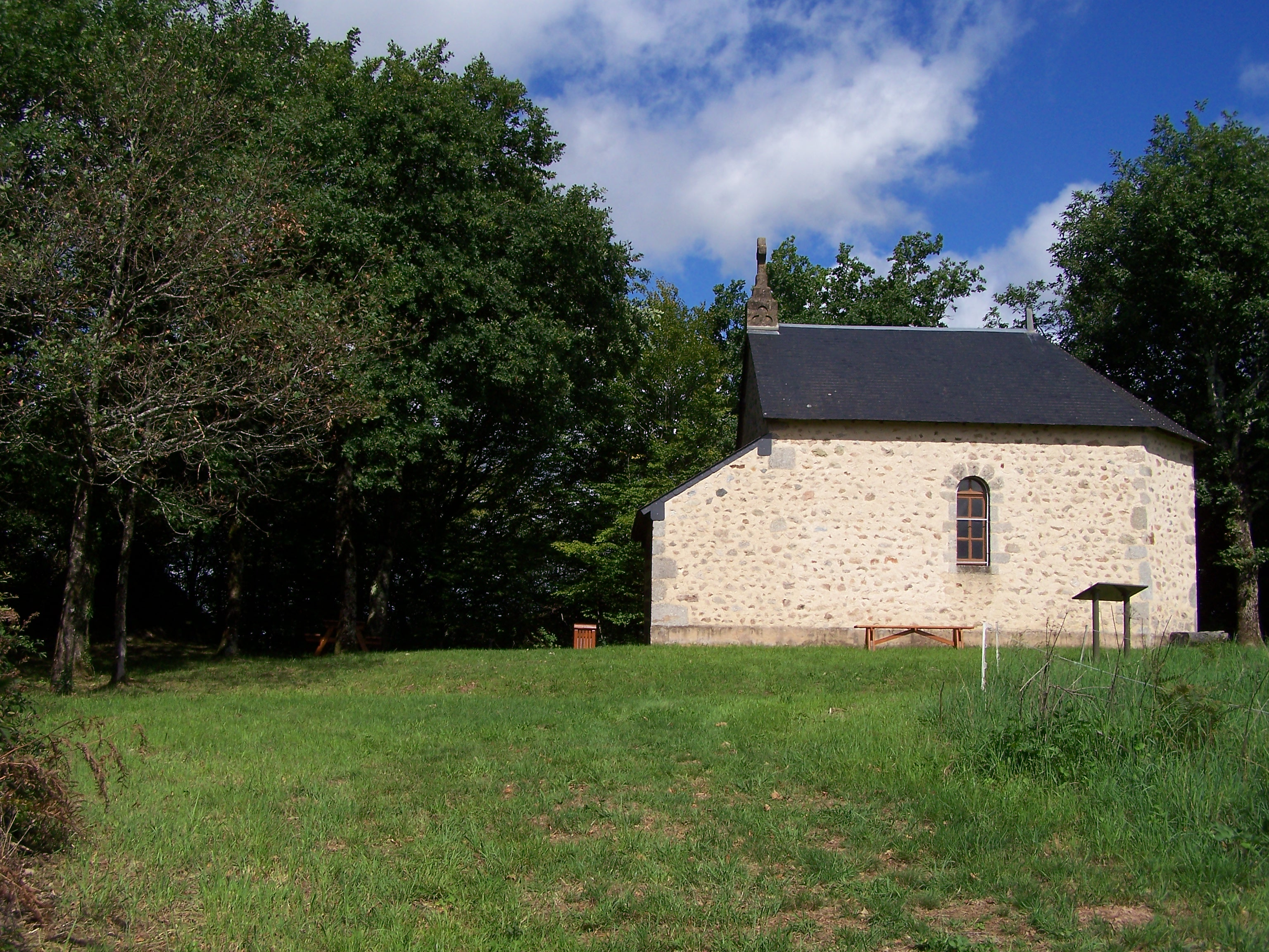 La chapelle Saint-Roch de Montbois à Château-Chinon (Campagne) (Nièvre, France)